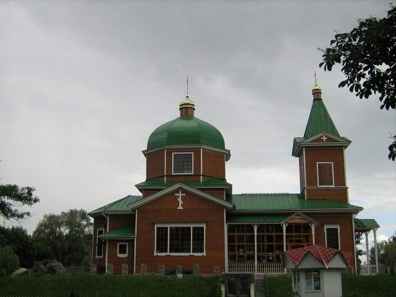 Свята-Міхайлаўская царква ў Гомелі (перавезена з вёскі Вылева Добрушскага раёна)